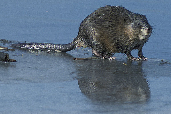 Bisam am Ufer.